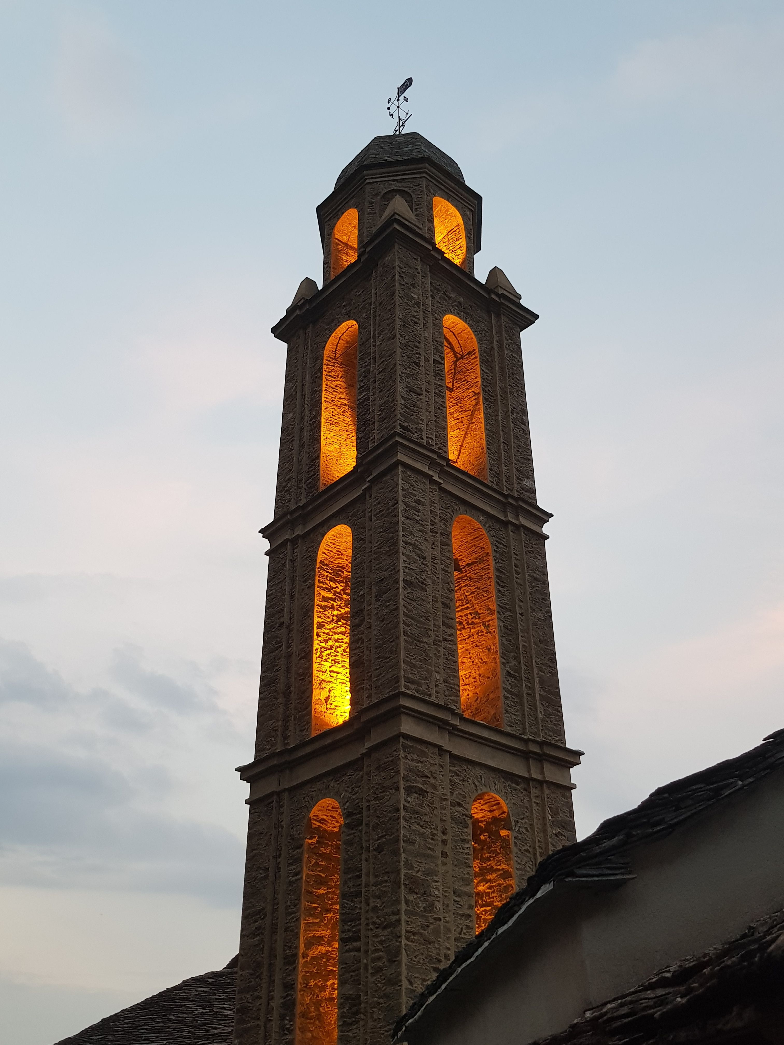 Clocher de Rapaghju